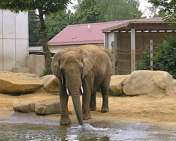 Zoo Augsburg (Bayerisch-Schwaben). Die Elefantenanlage. Eigene Aufnahme, Mai 2007 / Augsburg Zoo (Bavaria, Germany). Elephant. Own photo, May 2007